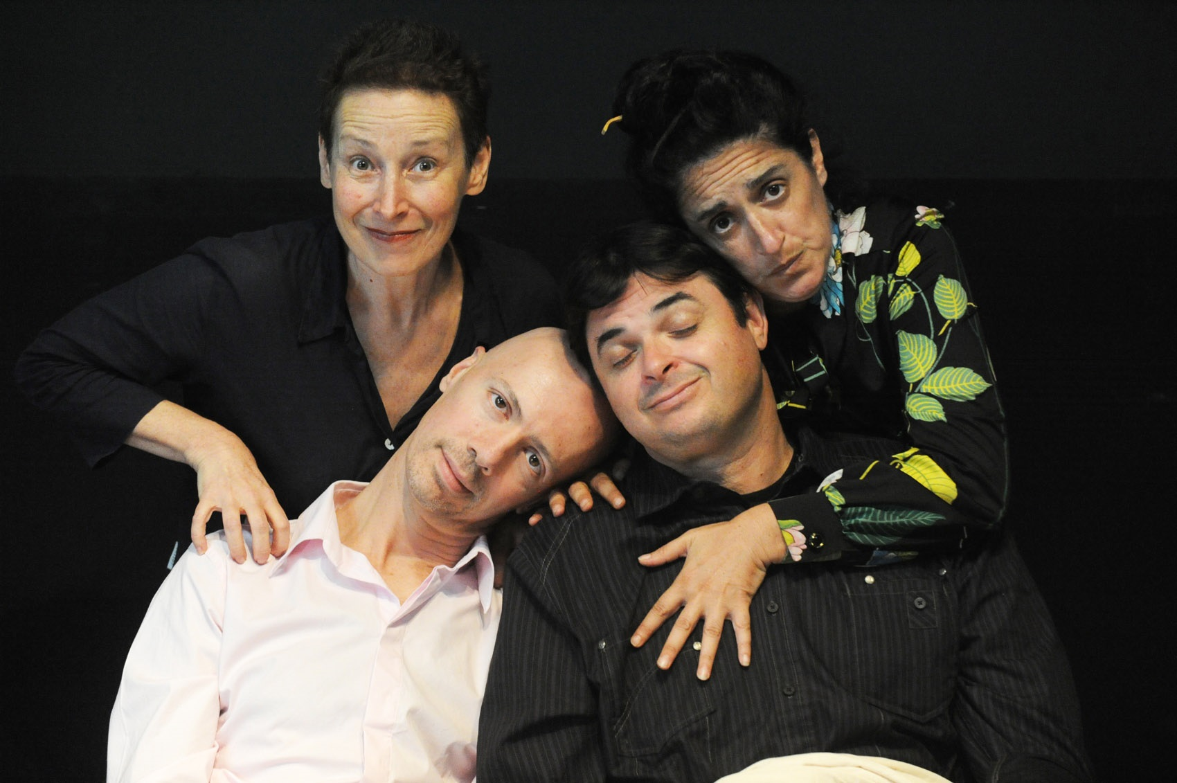 מימין לשמאל: פלורנס בלוך, דוד קיגלר, יוסי טולדו ודינה בליי-שור, בהצגה "קיגלר: חייו ומותו", מאת ובבימויו של עודד ליפשיץ, תיאטרון אנסמבל הרצליה, 2012